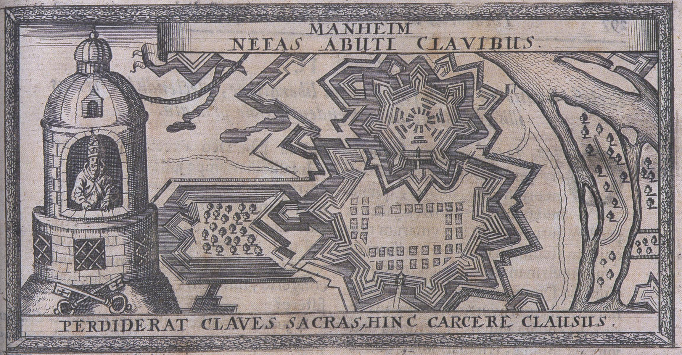 Johannes XXIII. (Gegenpapst) in Gefangenschaft zu Mannheim